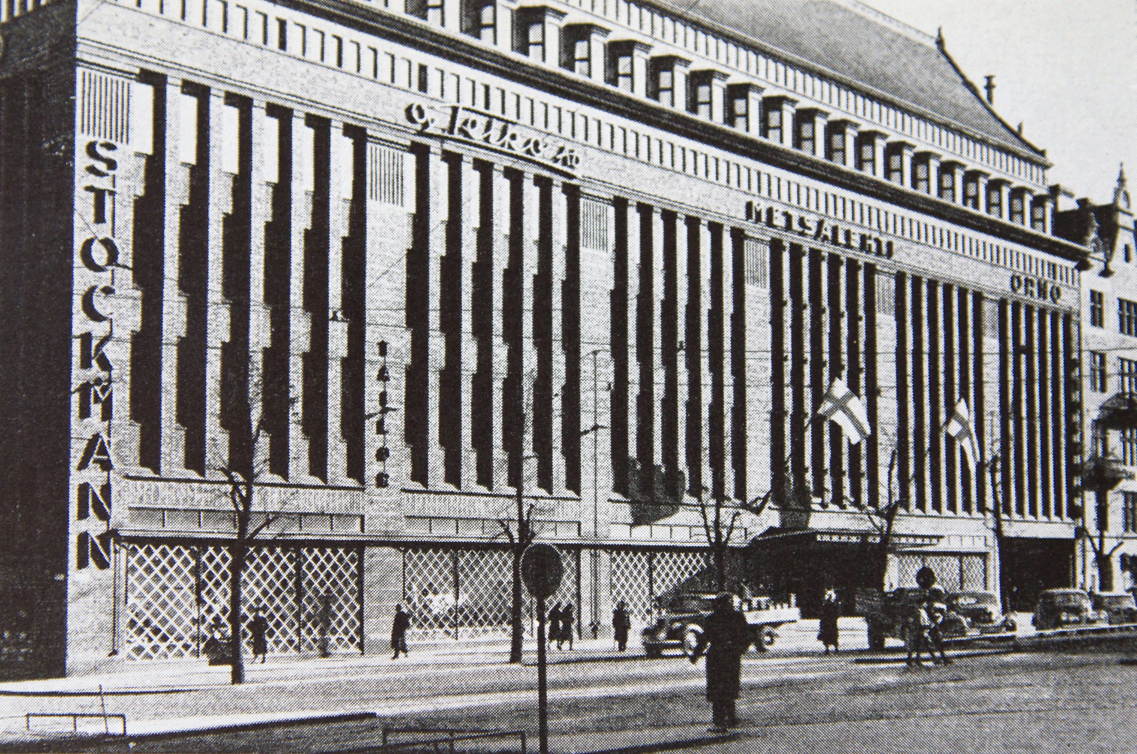 Stockmannin tavaratalon näyteikkunat vahvistettiin paperisuikaleilla marraskuussa 1939, ennen sodan alkamista.